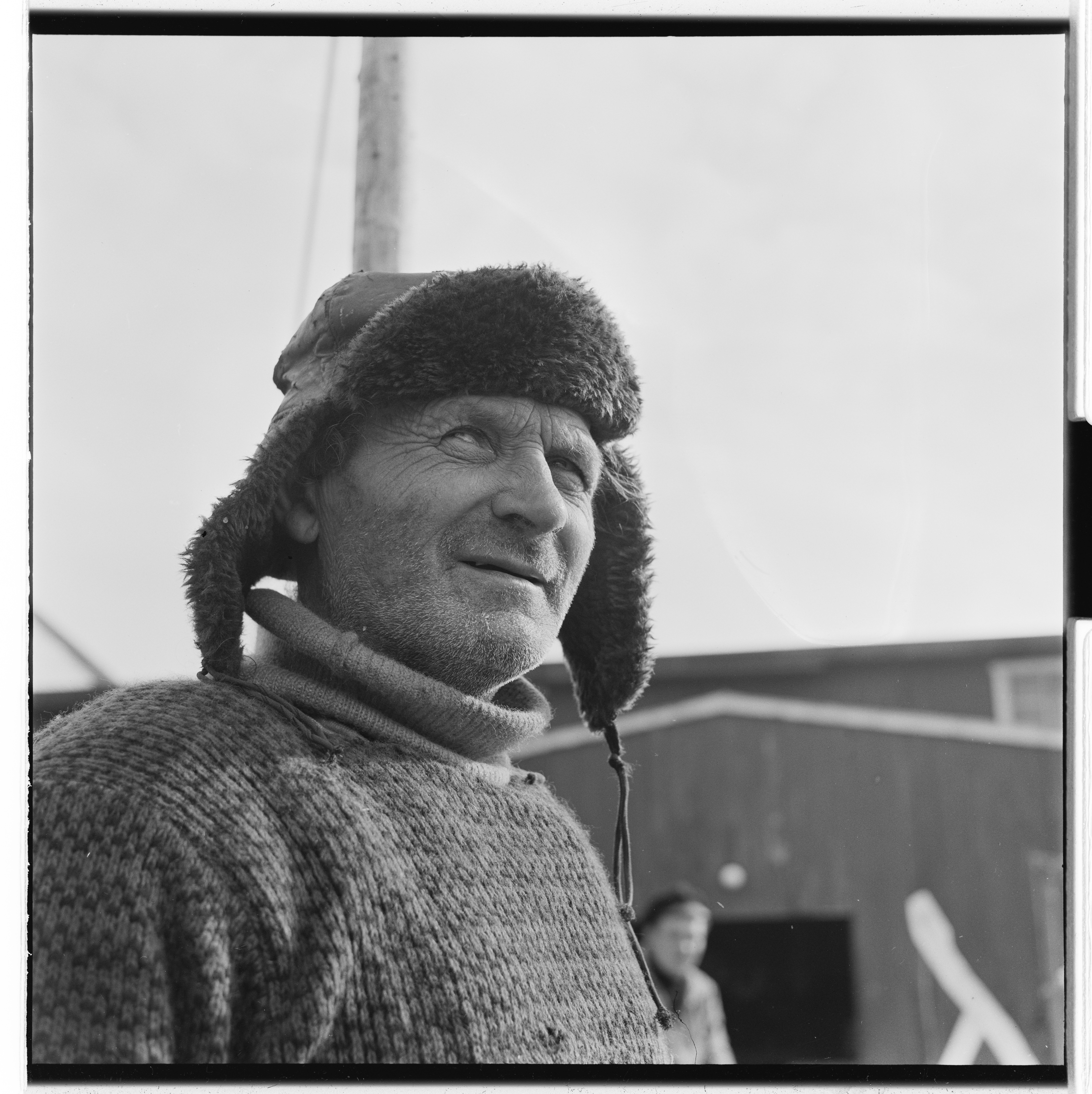 Bildet er hentet fra Arkivverket. Vårfiske på Vardø Arkivinstitusjon : Riksarkivet Arkivnavn : Billedbladet NÅ Sted : Norge, Finnmark, Vardø, Vardø Emneord: Industri, Arbeid, Fiskeindustri Avbildet